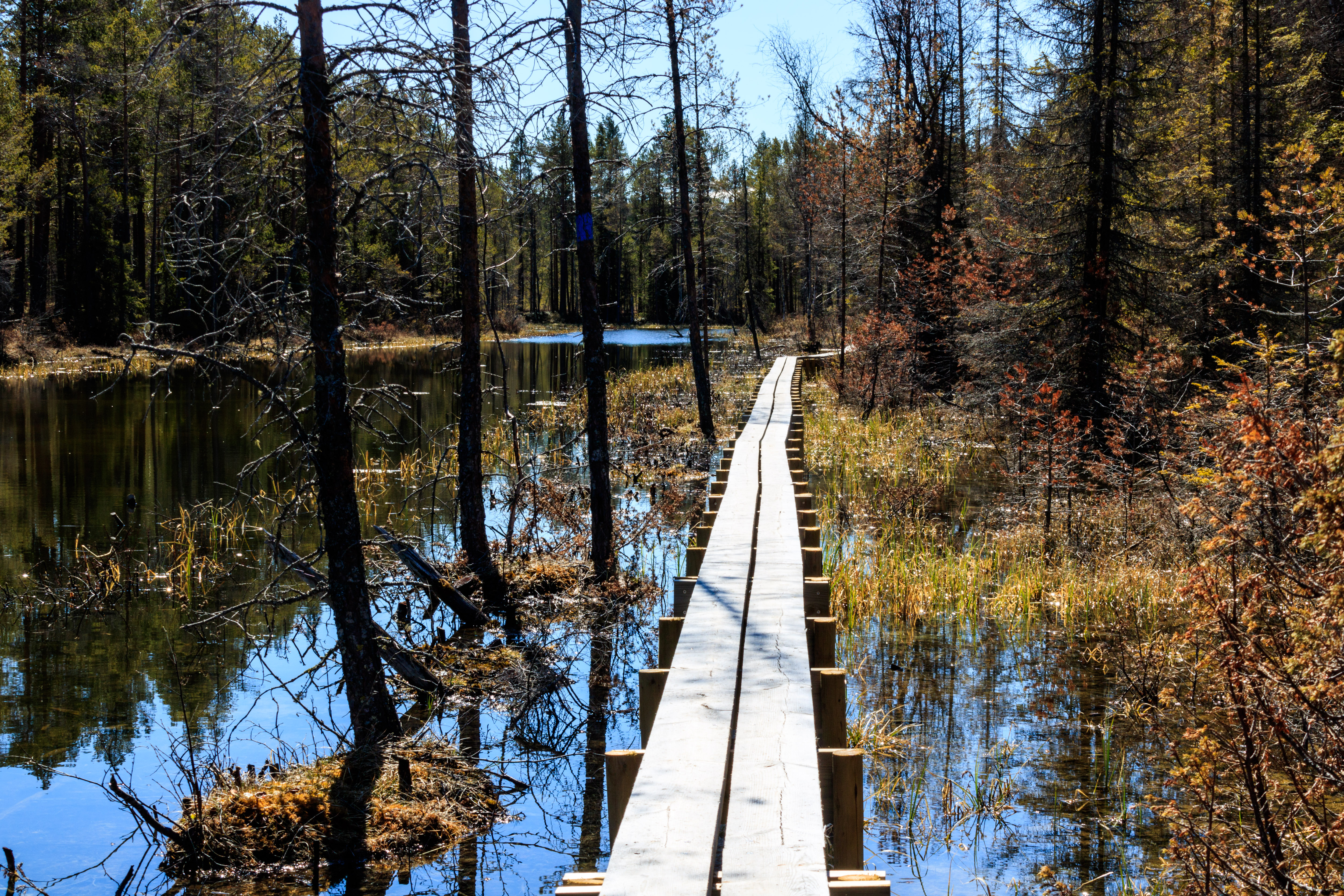 Tysjöarnas naturreservat. En spångad stig går runt sjöarna